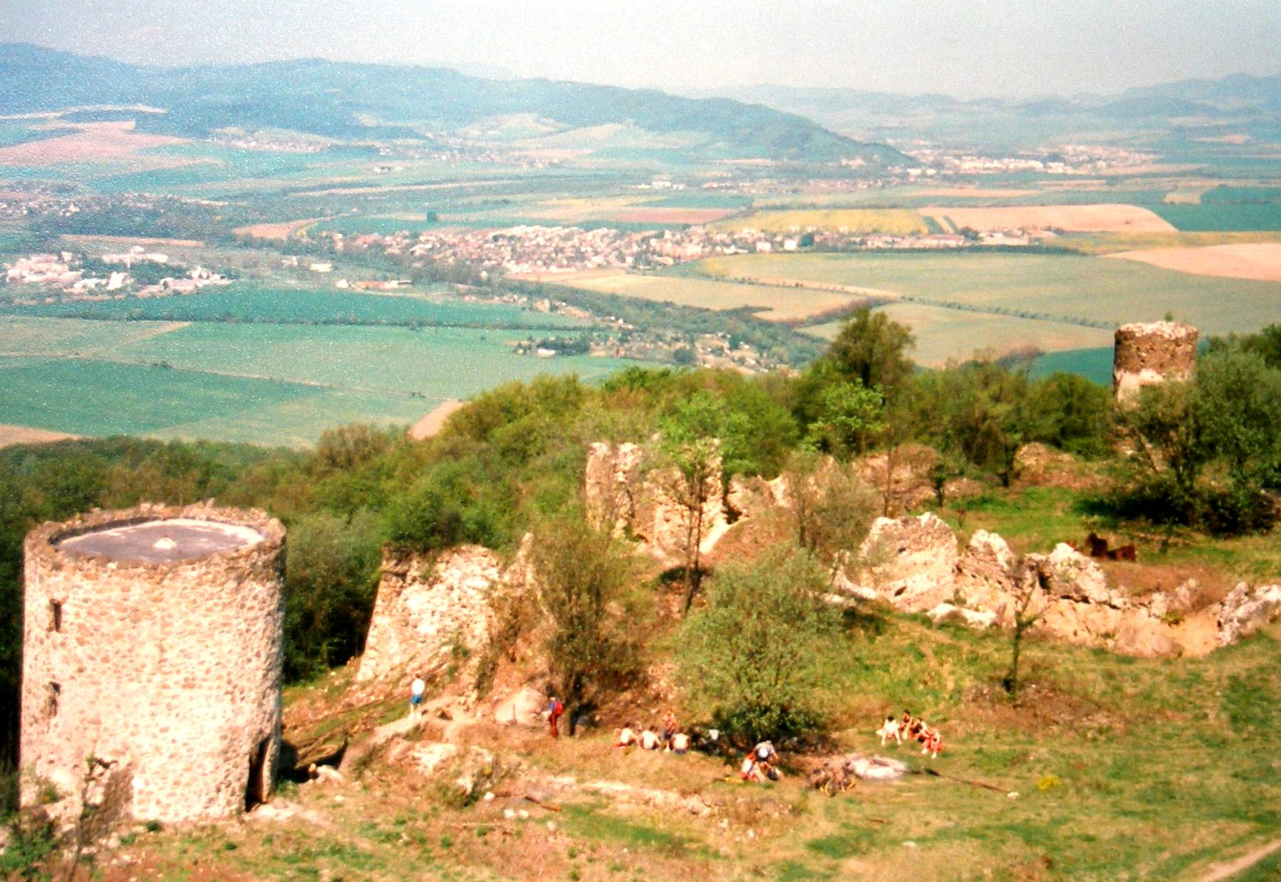 Šarišský hrad región Šariš, kraj Prešov